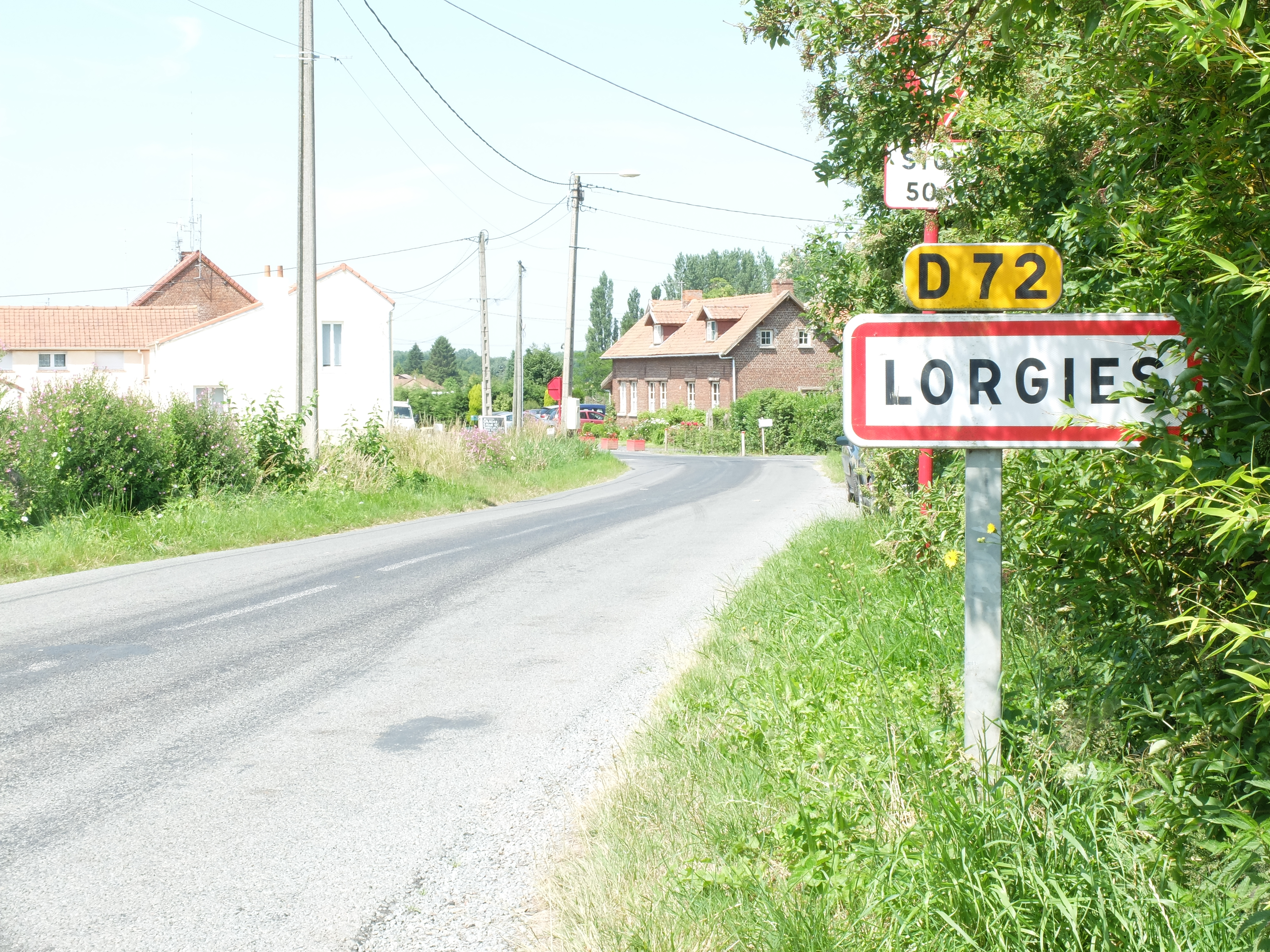 Vue d'une entrée de la commune de Lorgies.